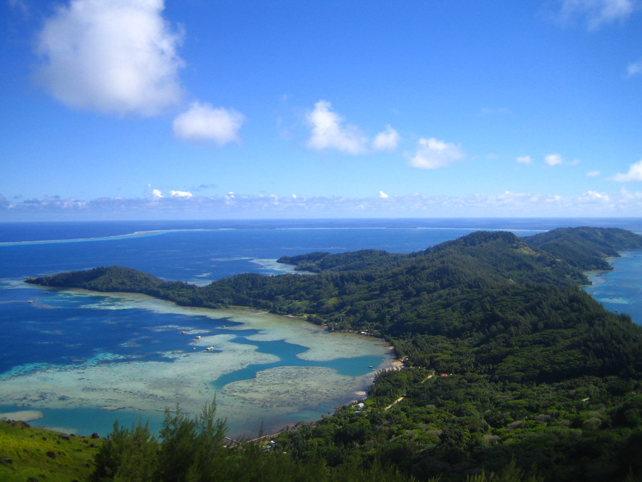 Blick vom Mont Mokoto auf die Insel Mangareva (Gambierinseln, Französisch-Polynesien)